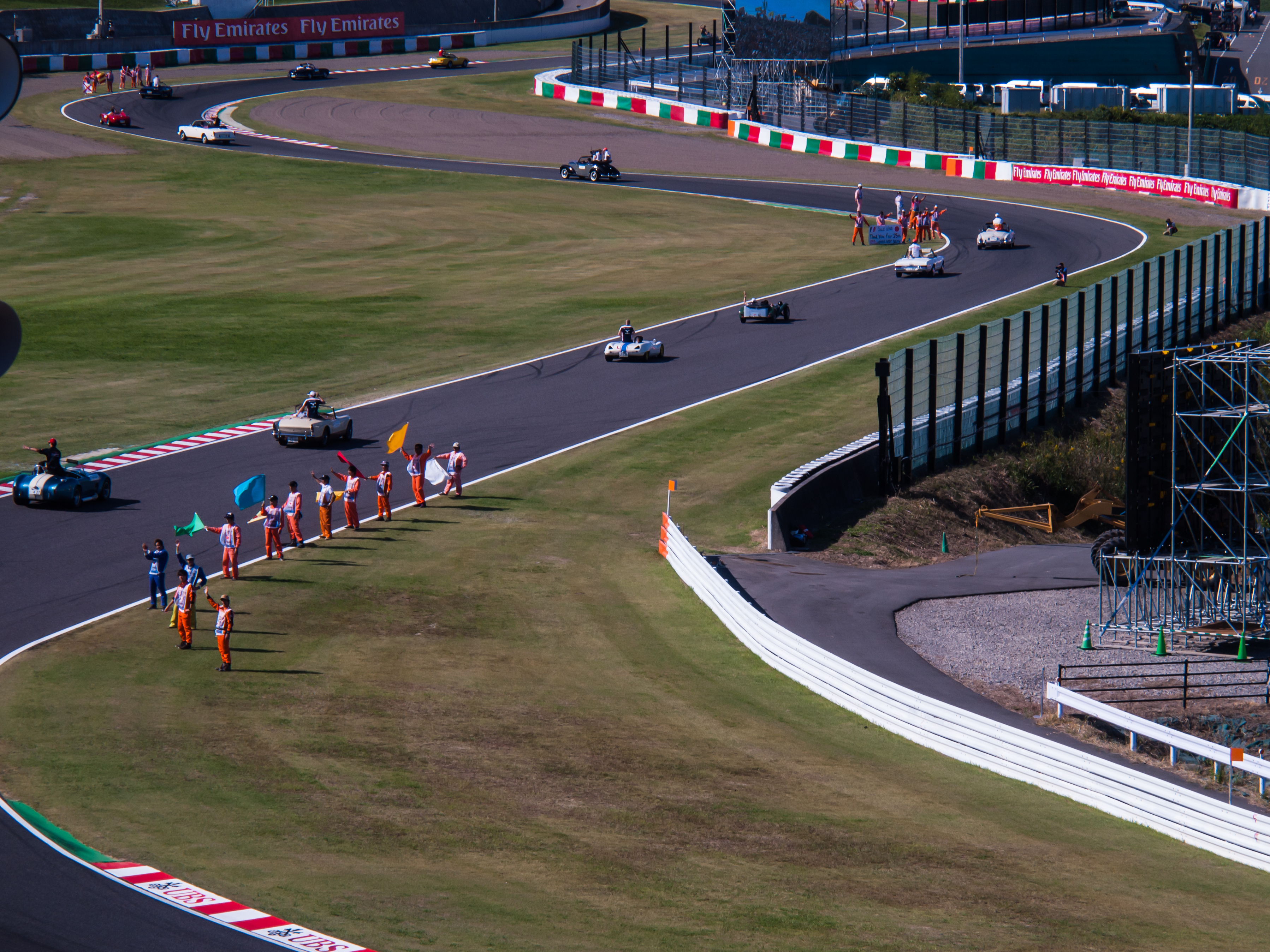 La parade des pilotes au GP du Japon 2013